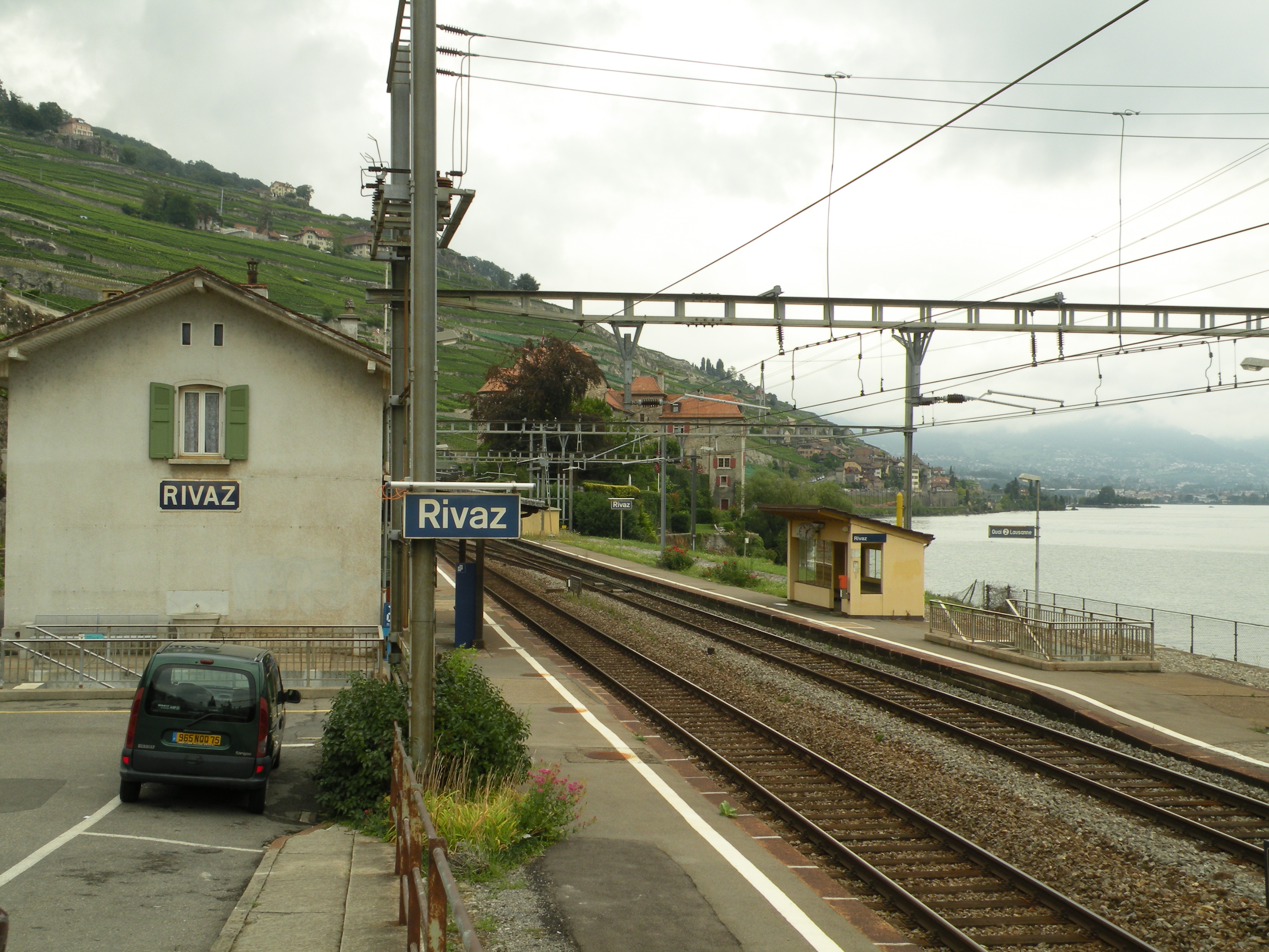 Gare CFF de Rivaz.